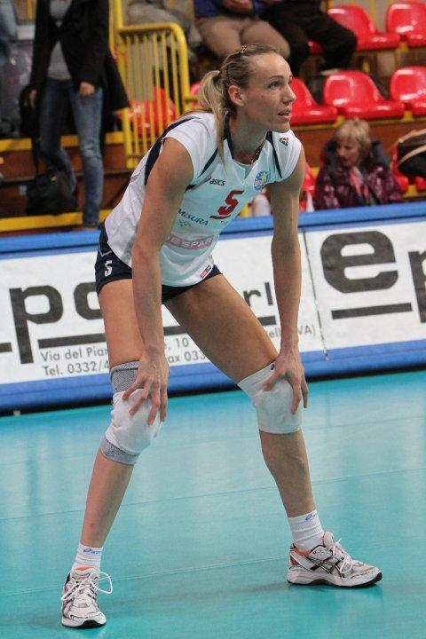 Antonina Zetova, pallavolista bulgara, gioca nel ruolo di opposto